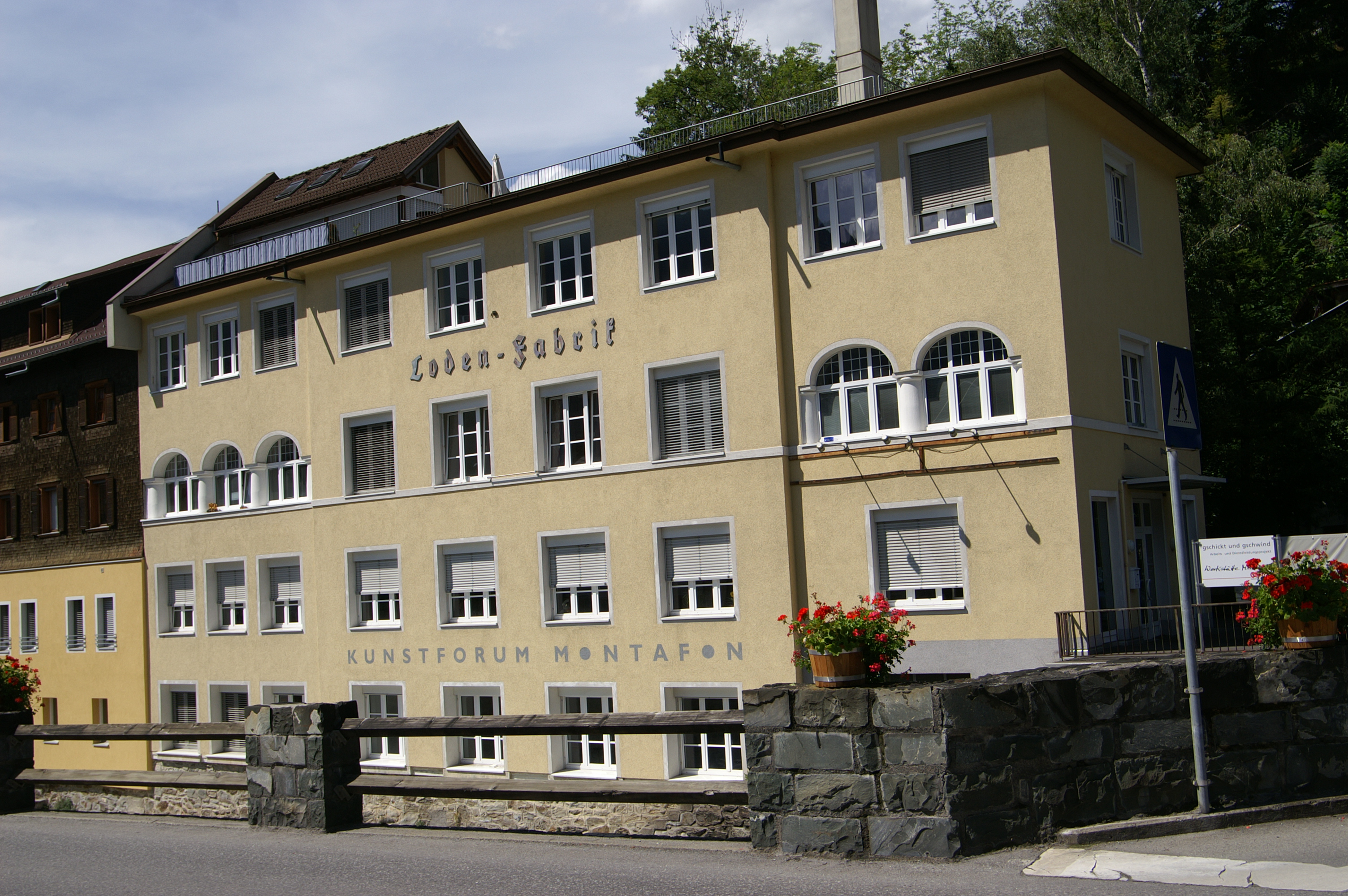 Lodenfabrik, Architekt Hanns Kornberger, in Schruns